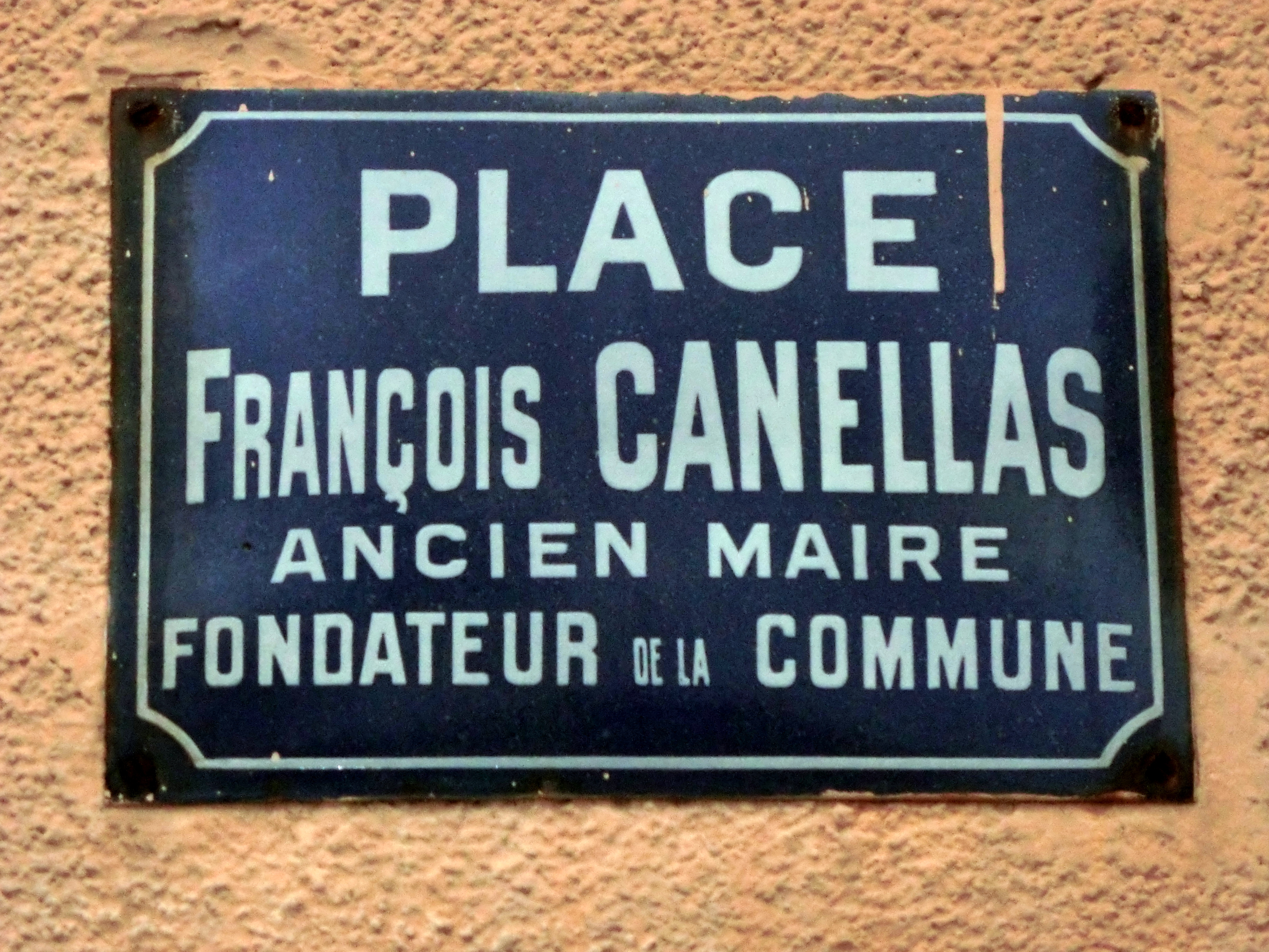 Plaque "place François-Canellas, ancien maire, fondateur de la commune".